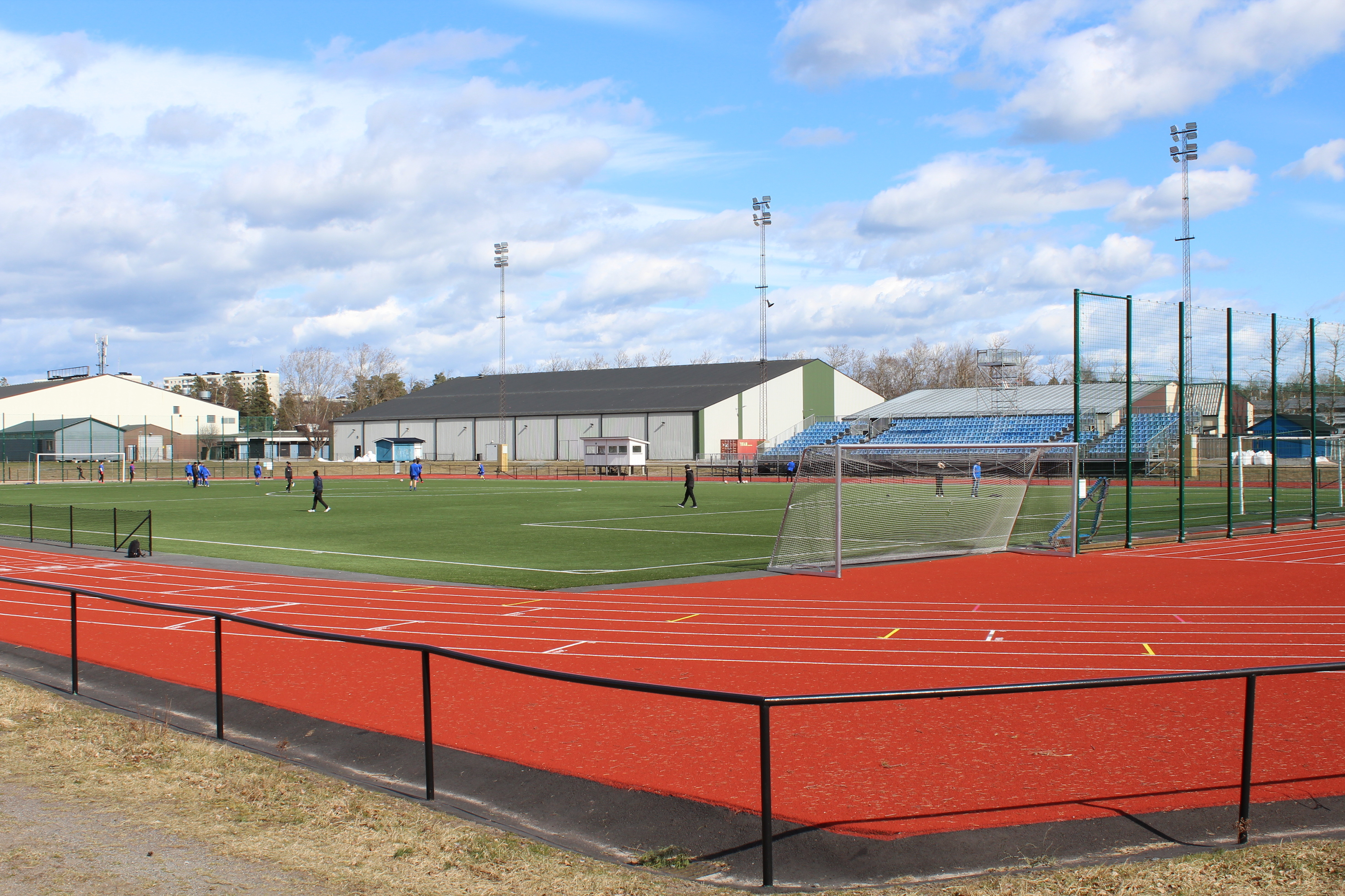 Torvalla idrottsplats, Haninge kommun, Sverige